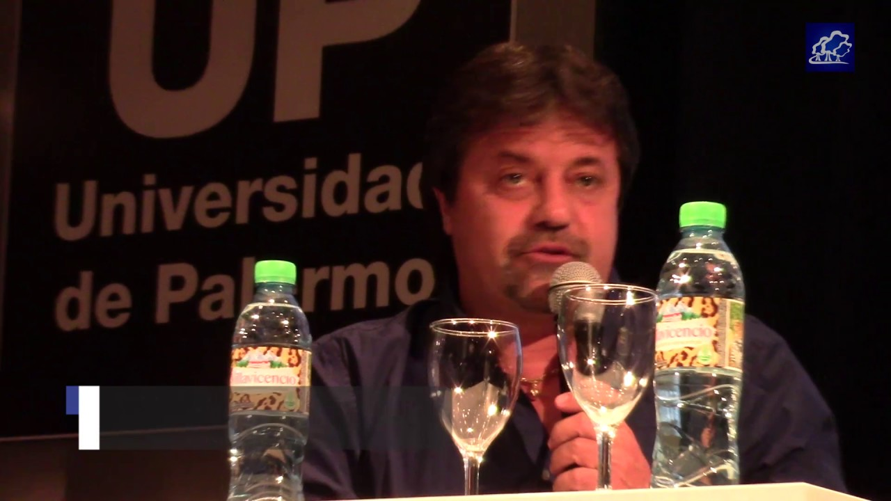 Ricardo Caruso Lombardi durante una charla con alumnos de la Universidad de Palermo